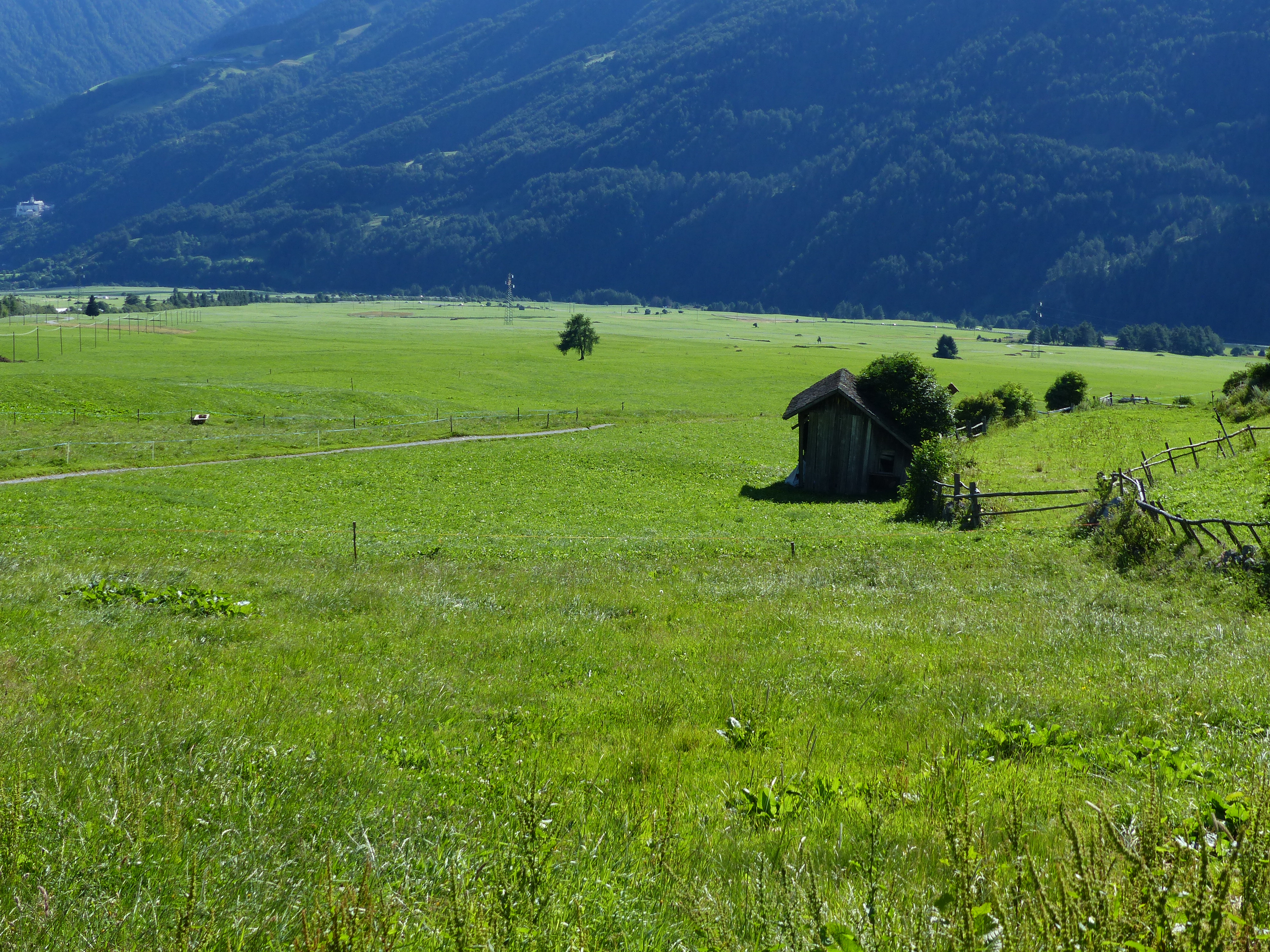 Blick von Plawenn auf die Malser Haide. Im Hintergrund am linken Bildrand die Abtei Marienberg über Burgeis.